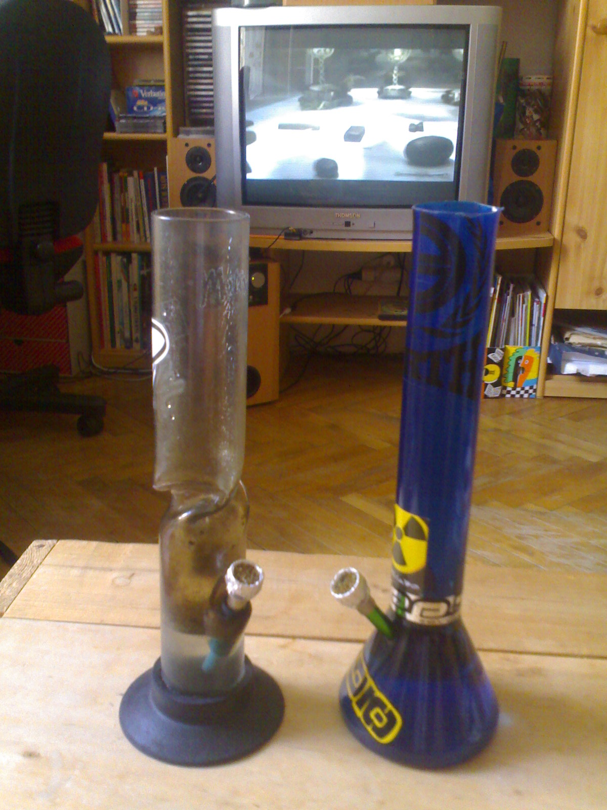 moje vlastní foto